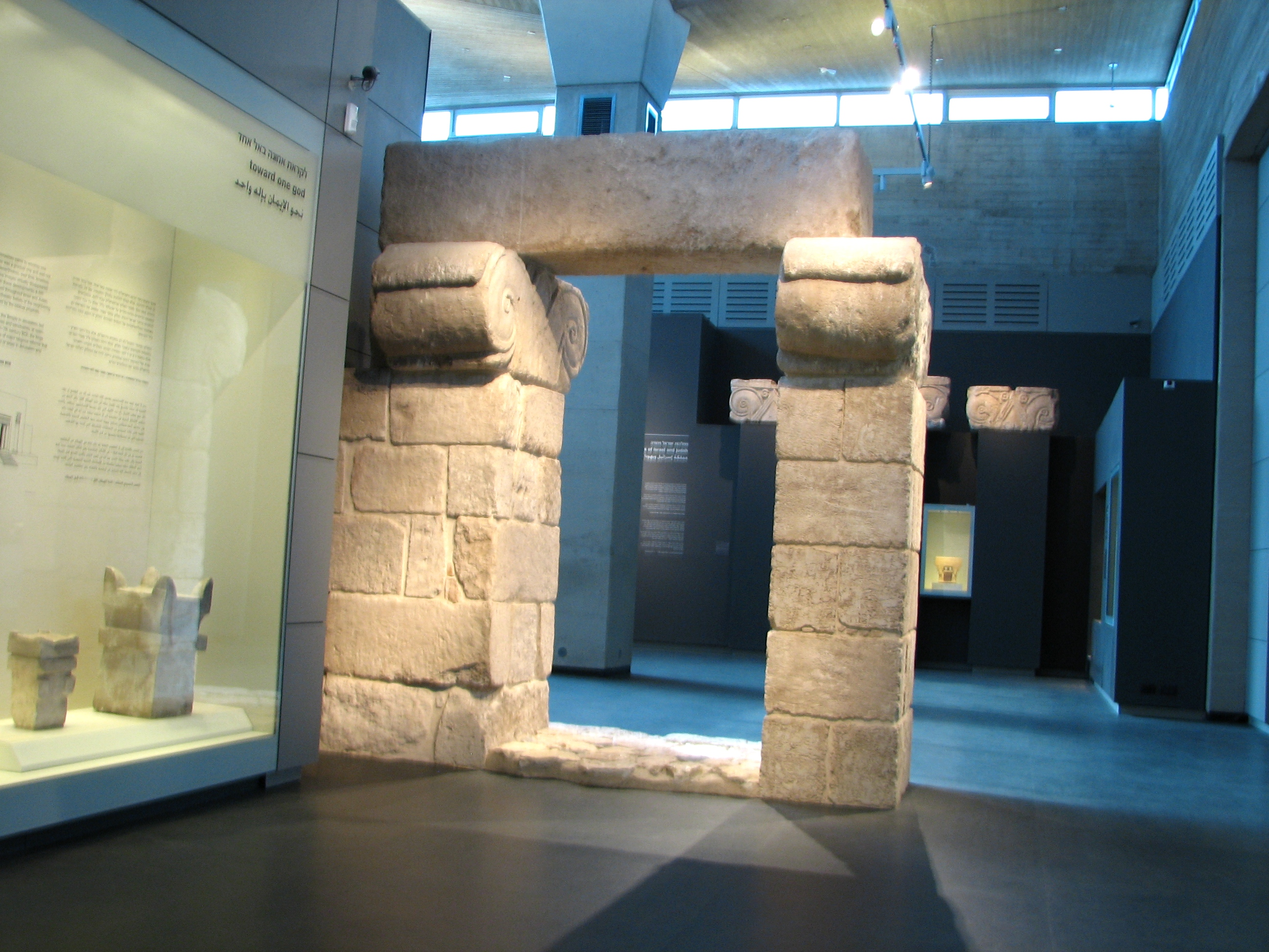 Tel Hazor ממצאים מתל חצור. מוצגים במוזיאון ישראל Royal fortress gate. This is the half right of a double gate that stood at the entrance of the fortress of Hazor in the time of king Ahab. It is built of finely hewn blocks שער מצודה מלכותית מאבן גיר, מתוארך למאה התשיעית לפני הספירה. מחצית ימנית של שער כפול שהיה קבוע בכניסה למצודת חצור בימי המלך אחאב. השער בנוי אבני גזית מסותתות ומעוטר בשתי כותרות מגולפות התומכות במשקוף מרשים בגודלו - אחור